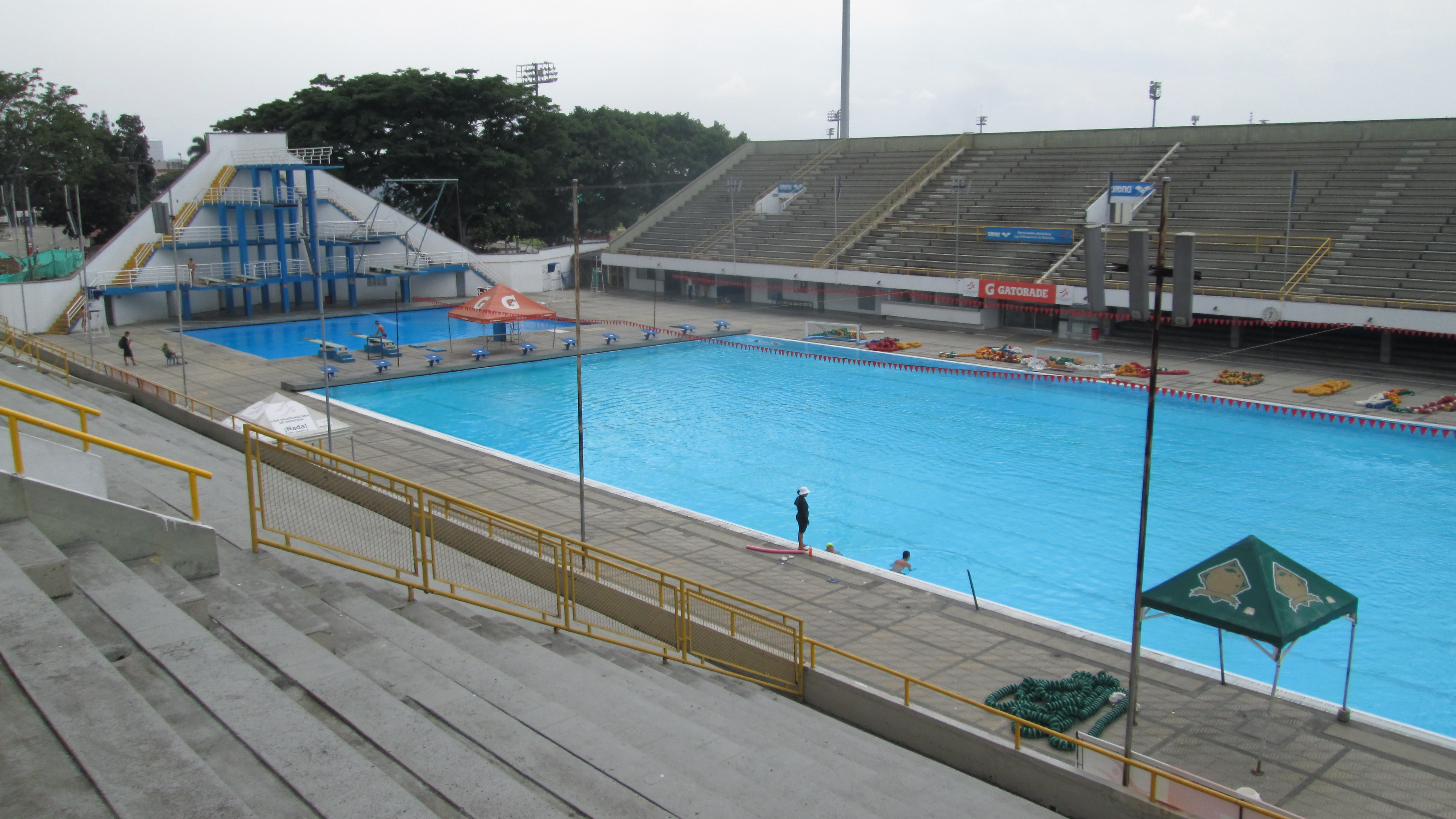 Piscinas Panamericanas en Cali